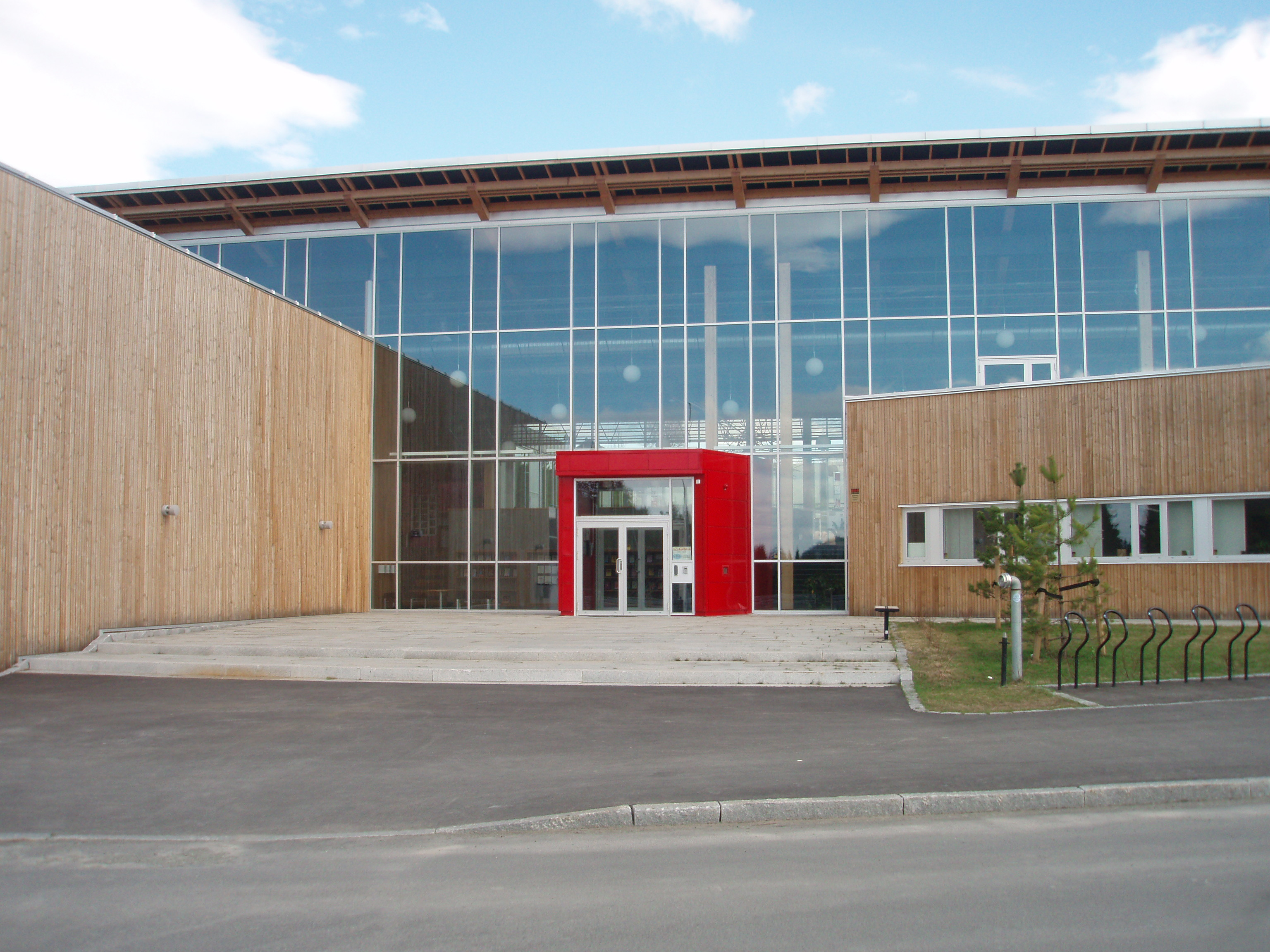 Inngangen til Brekkåsen skole i Melhus